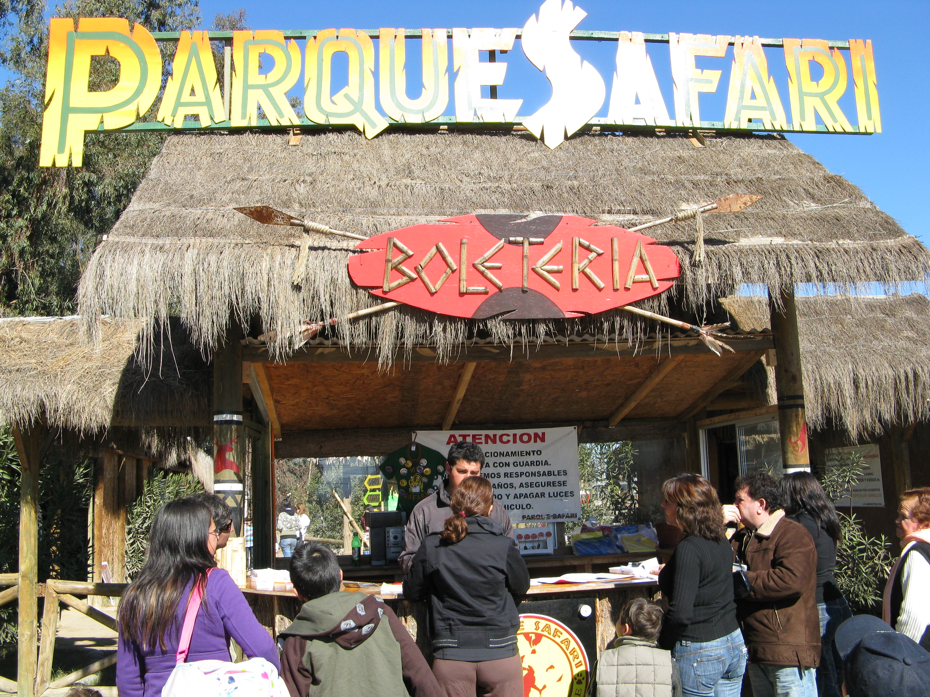 Parque Safari Rancagua